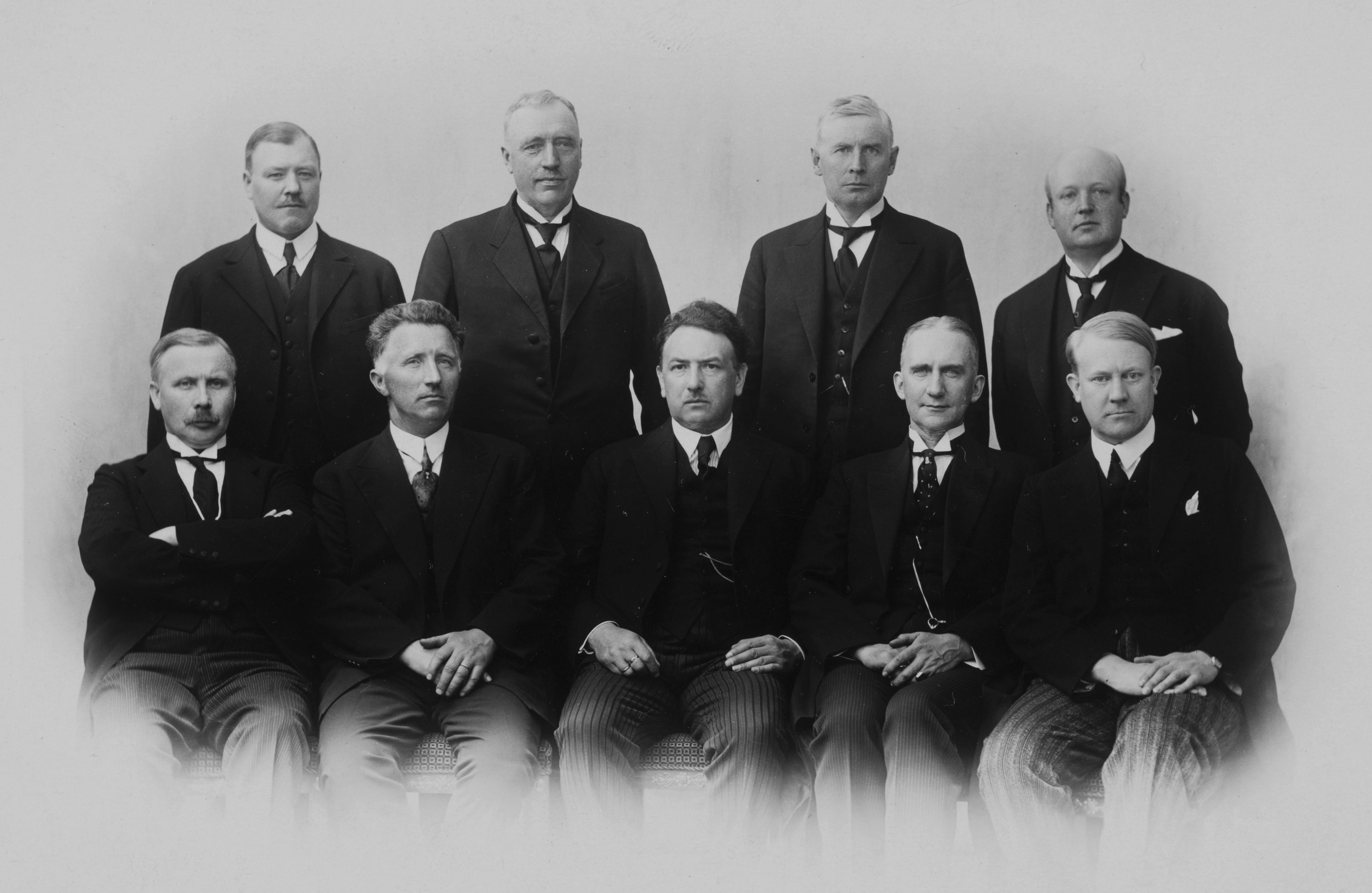 Statsminister og finansminister Peder Kolstad, utenriksminister Birger Braadland, kirke- og undervisningsminister Nils Trædal, justisminister Asbjørn Lindboe, forsvarsminister Vidkun Quisling, handelsminister Per Larssen, arbeidsminister Rasmus Langeland, landbruksminister Jon Sundby, sosialminister Jakob Vik, alle Bondepartiet.